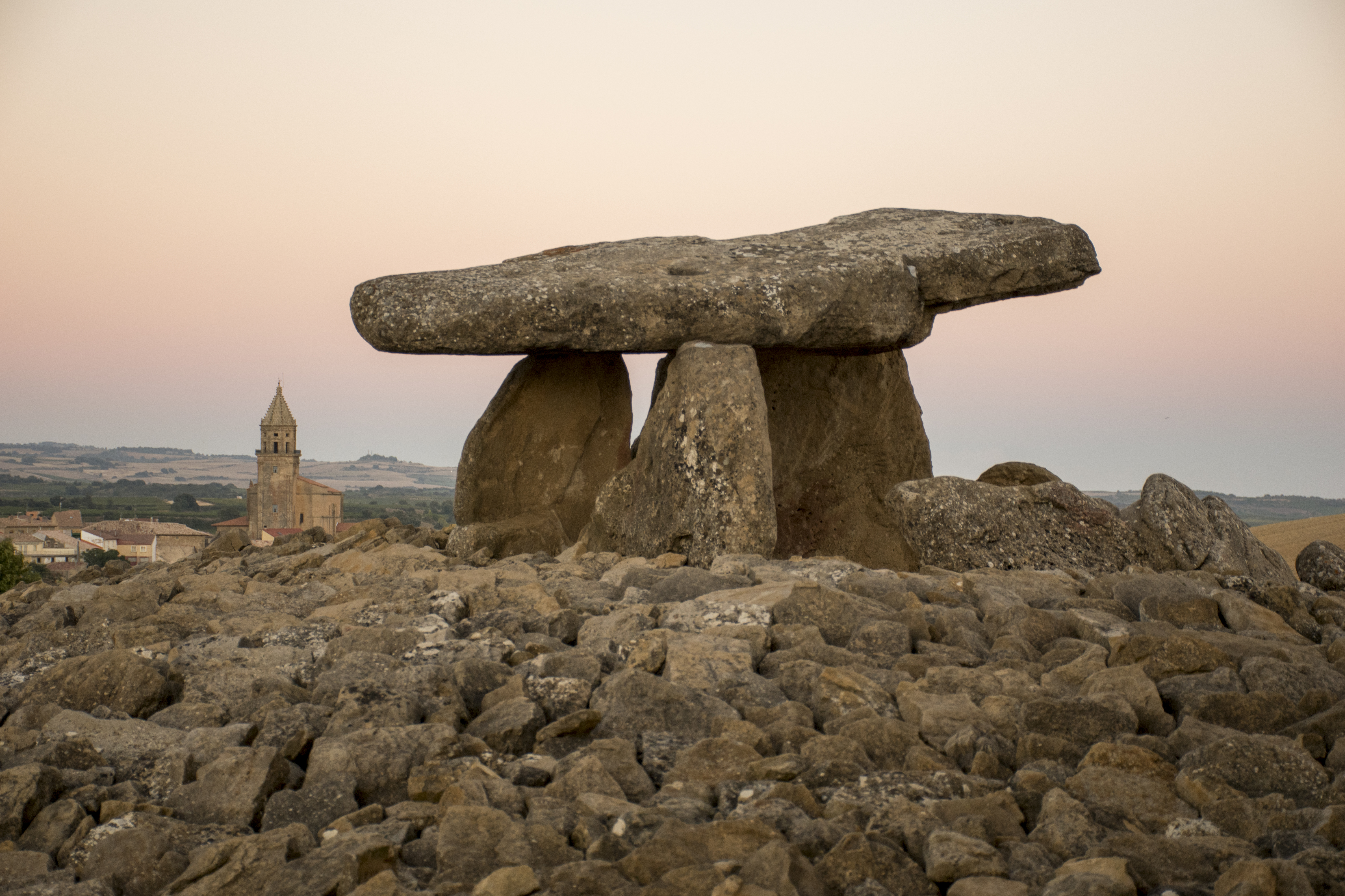 Sorginaren Txabola trikuharria